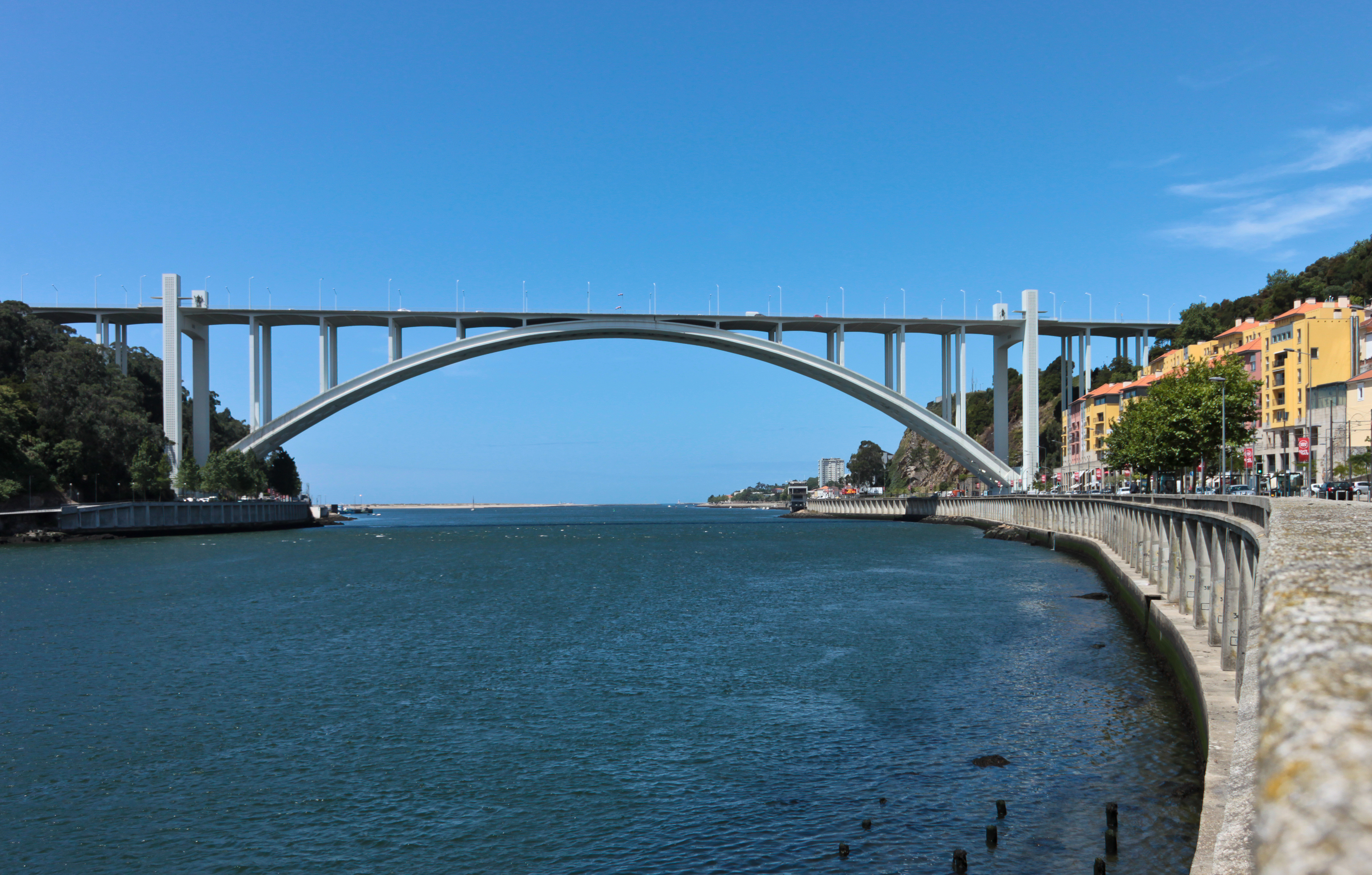 Desenhada pelo engenheiro Edgar Cardoso This file was uploaded for Wiki Loves Monuments in Portugal with the unique identifier 70797.